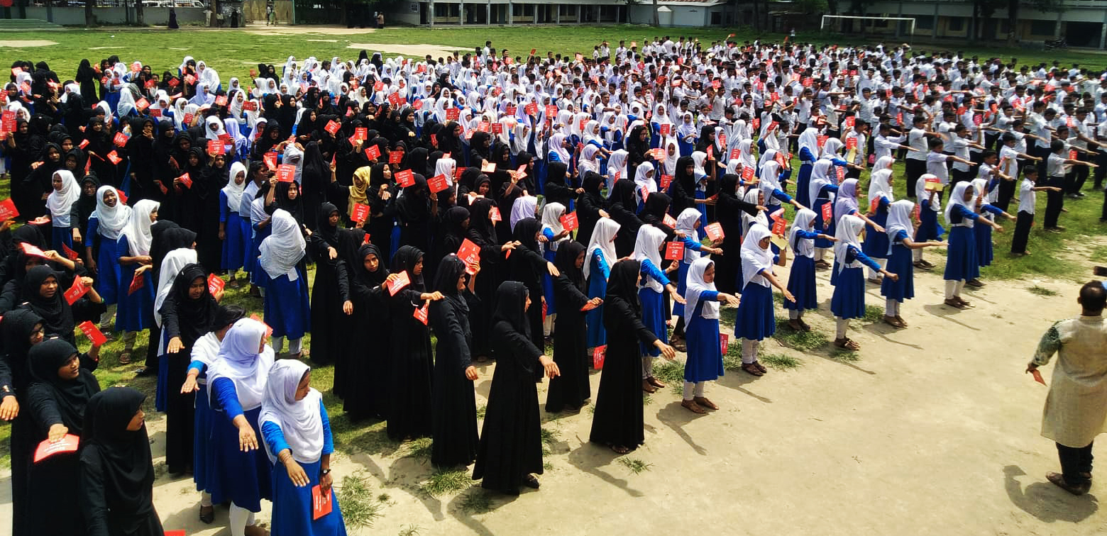 বাল্যবিয়ে বিরোধী শপথ নিচ্ছেন বাংলাদেশের একটি বালিকা বিদ্যালয়েরি শিক্ষার্থীরা। এটি ব্র্যাক এর একটি সামাজিক কর্মসূচি